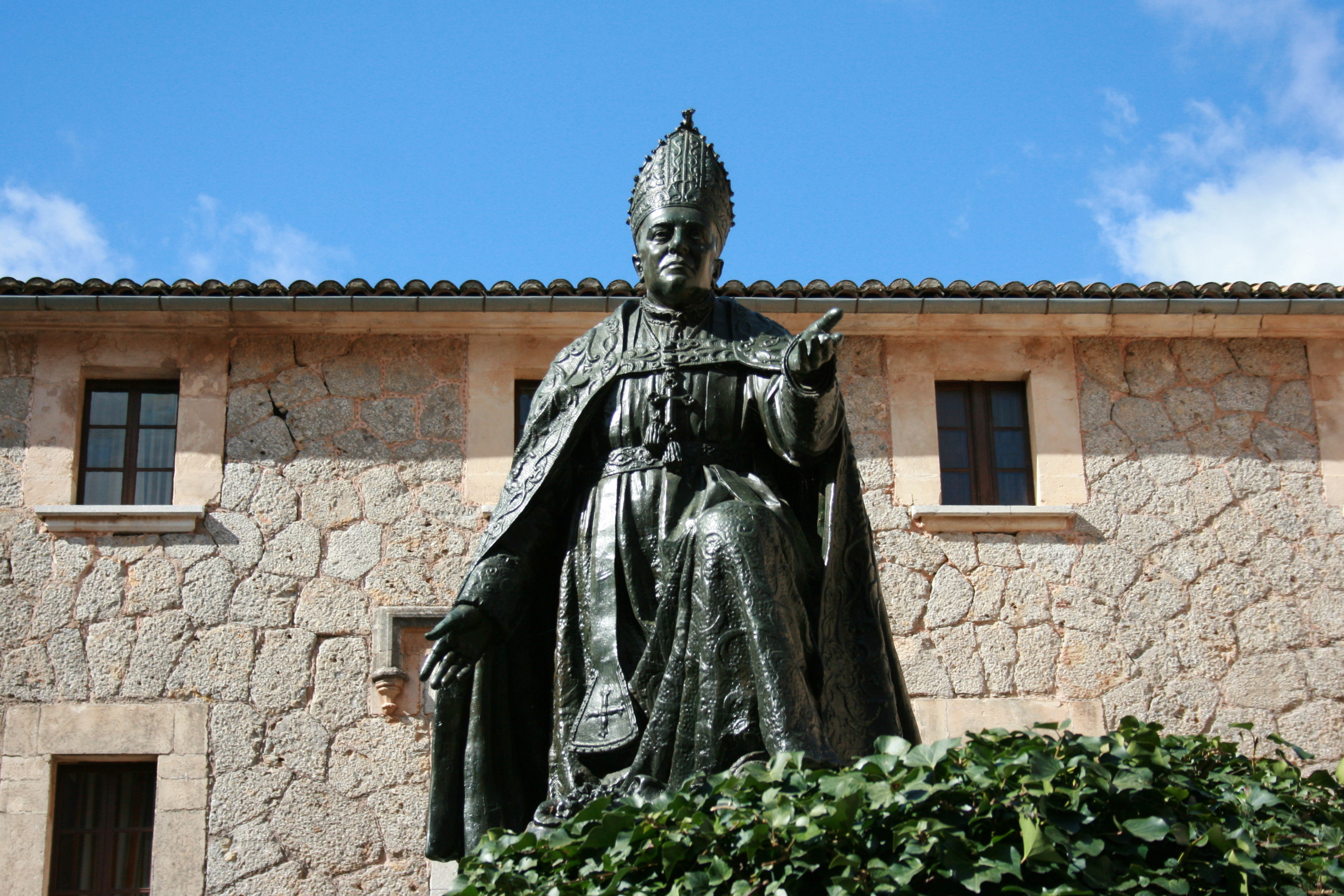 Statue of Pere Joan Campins, Santuari de Lluc in Escorca, Mallorca